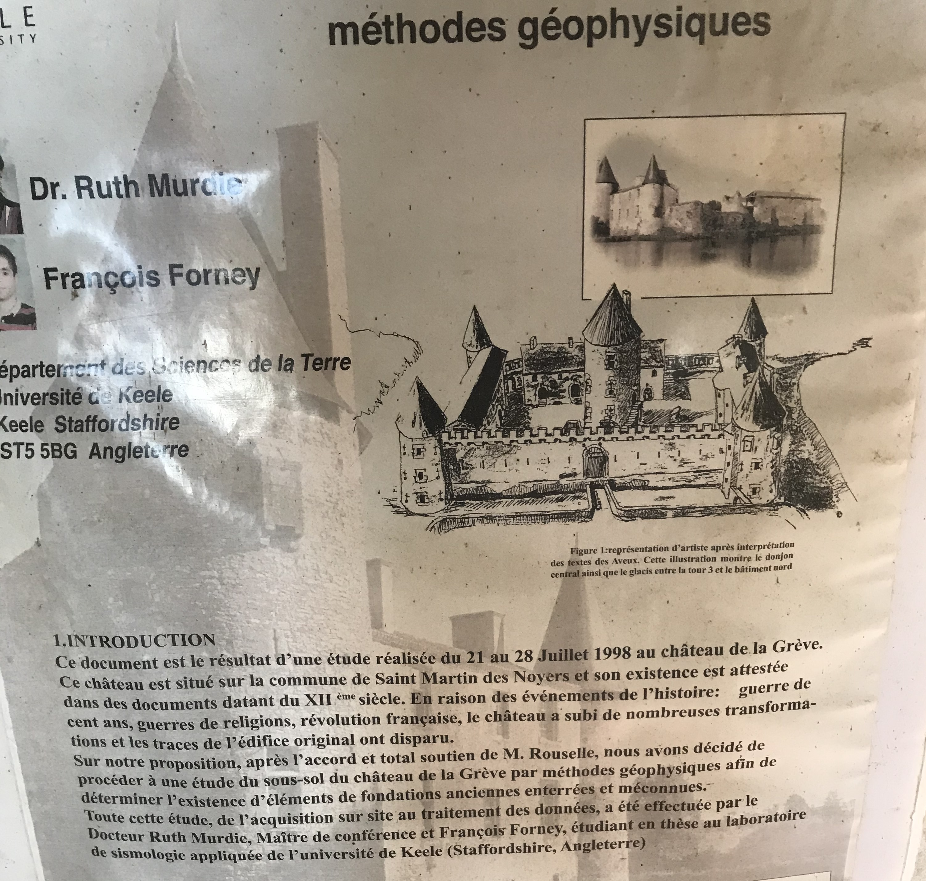 Etude du sol château de la Grève